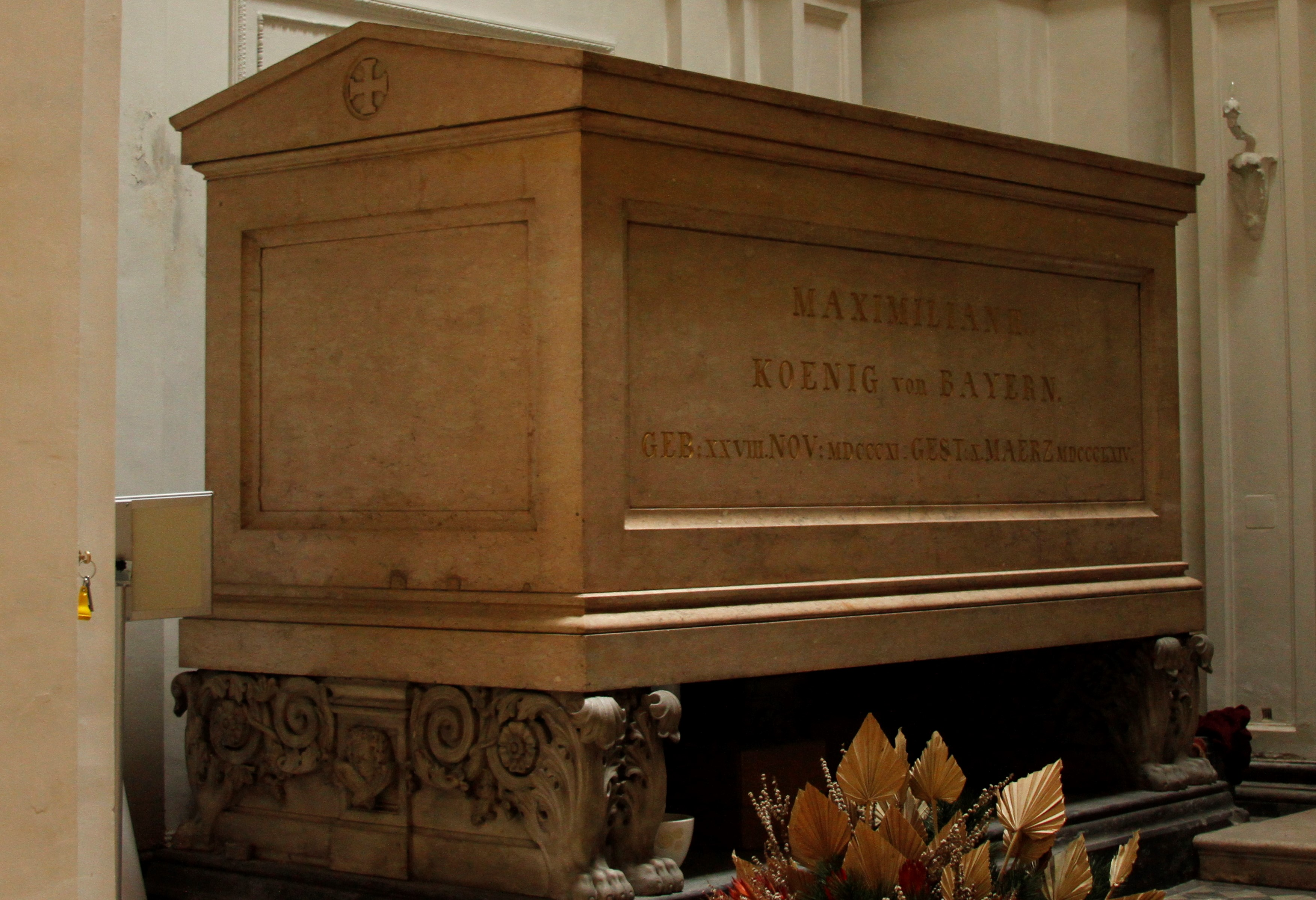 Theatinekirche - Munich - Germany